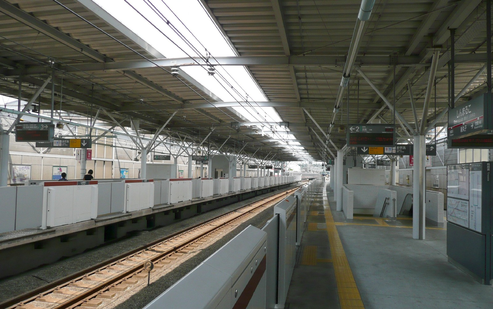 新丸子駅ホーム